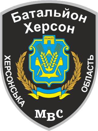 Нарукавний шеврон батальйону МВС «Херсон»